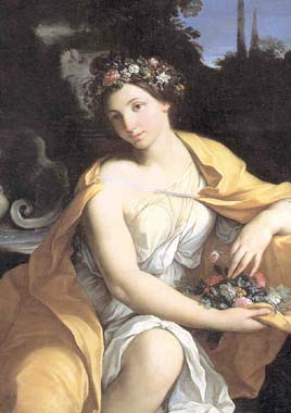 La Primavera